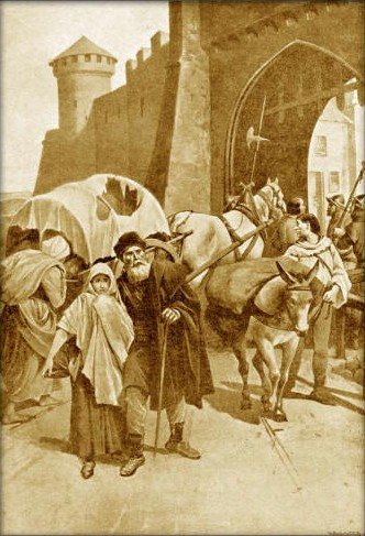 Věnceslav Černý (1865-1936) - Eliška Přemyslovna prchá v přestrojení z Prahy